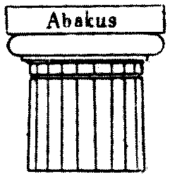 Illustratsioon raamatust Hariduse sõnaraamat / Toimetanud J. Muide.Tartu 1908.